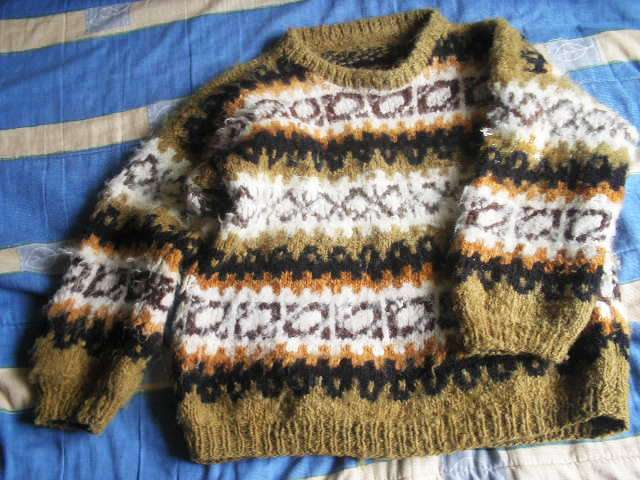 Chompa artesanal de lana de oveja teñida con productos vegetales, Chiloé, Chile